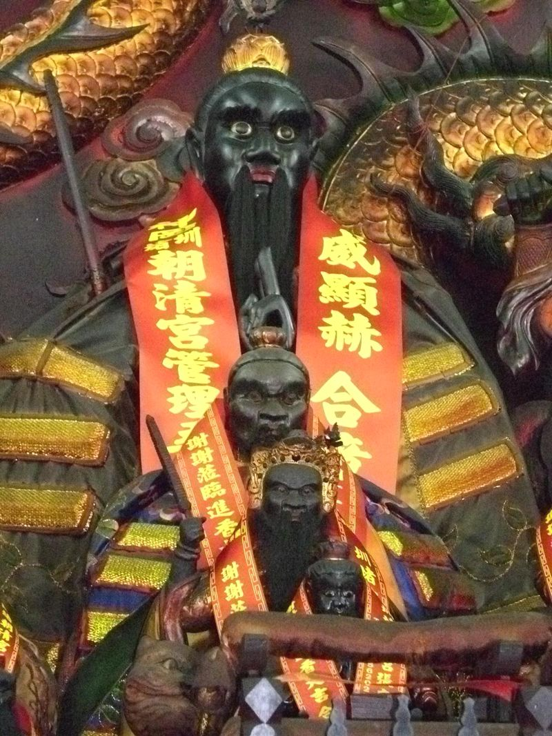 Shengang District, Taichung.中文（台灣）: 位在臺中市神岡區圳堵里。